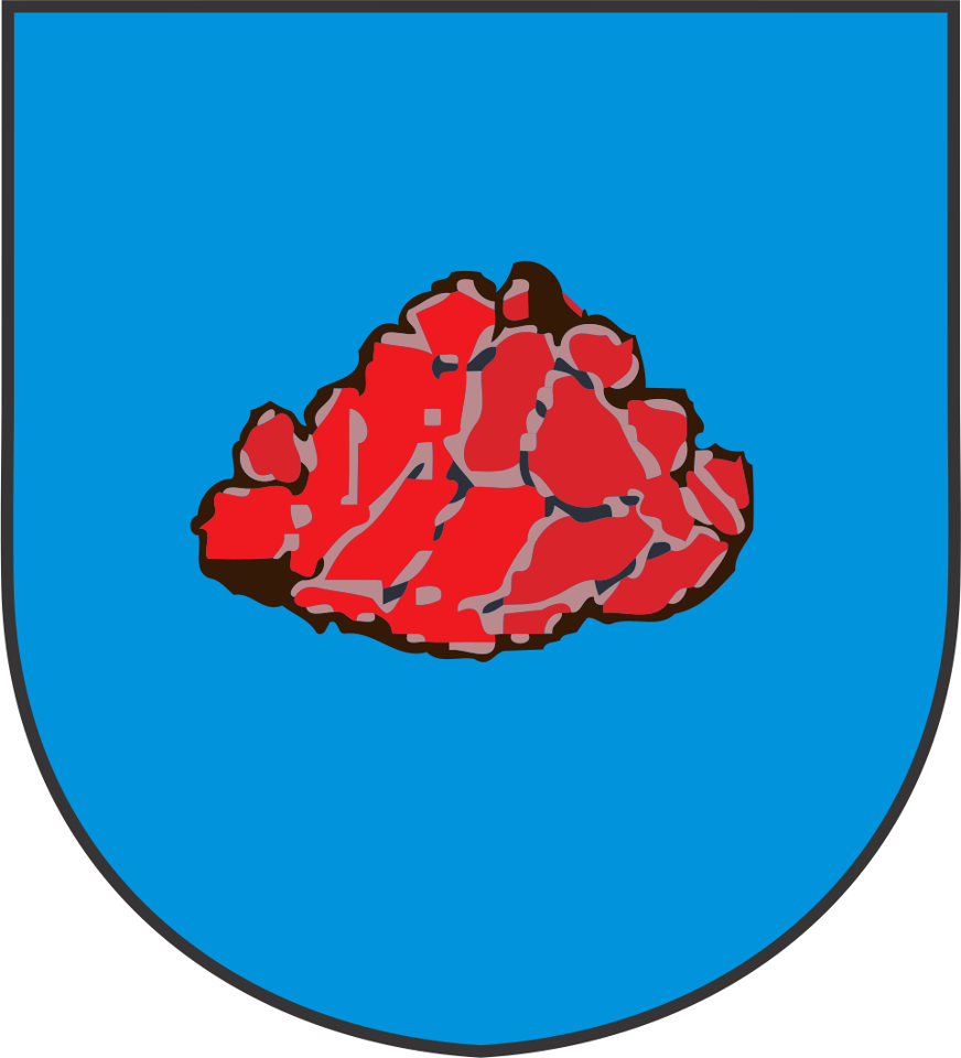 Герб Рудзенска, Пухавіцкі раён, Беларусь. Створаны 1 лiстапада 2012 года, аўтар герба — Паўлюк Шапецька